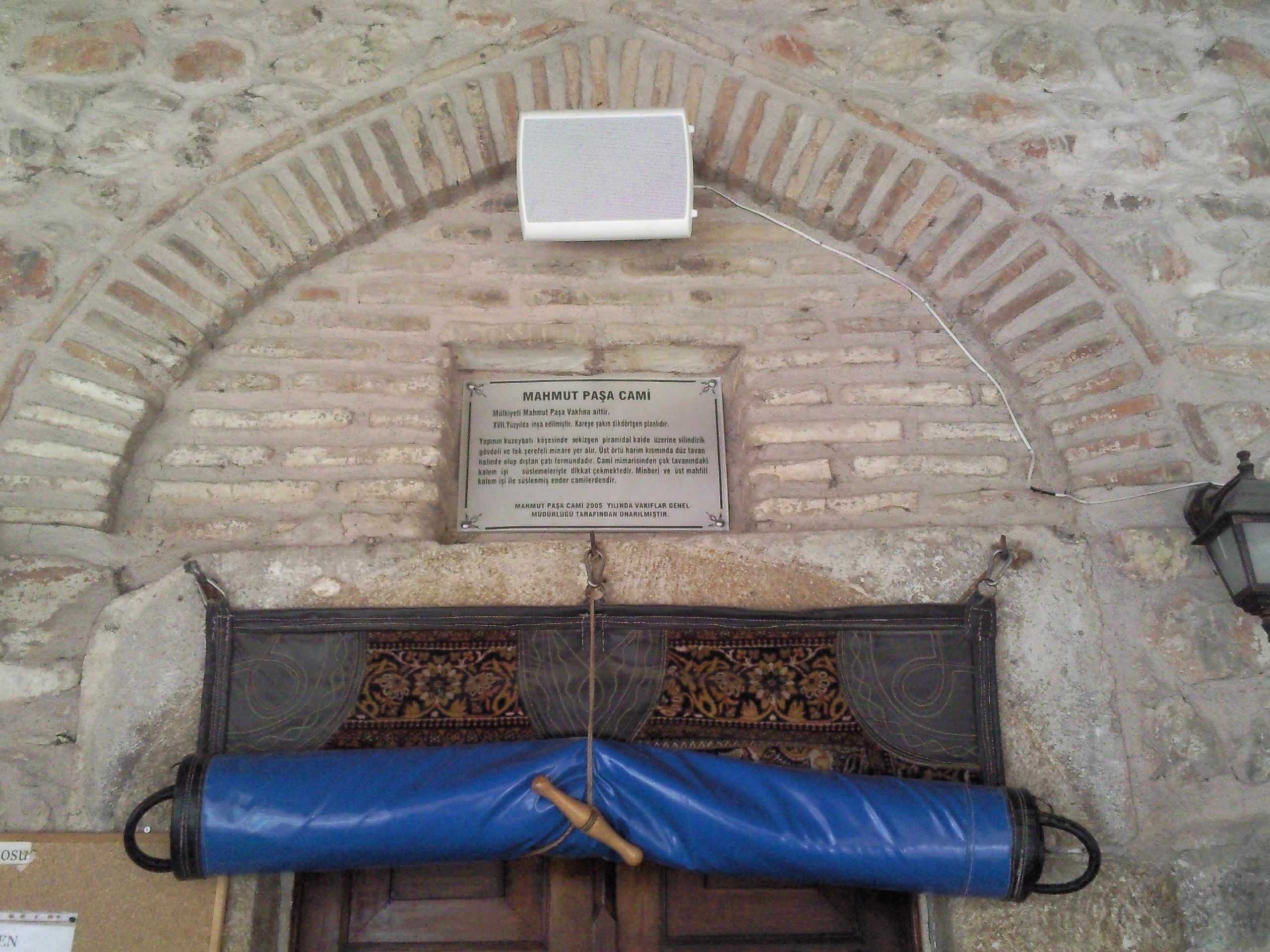 Tokat'ta bulunan Mahmut Paşa Camii'nin giriş kapısı.